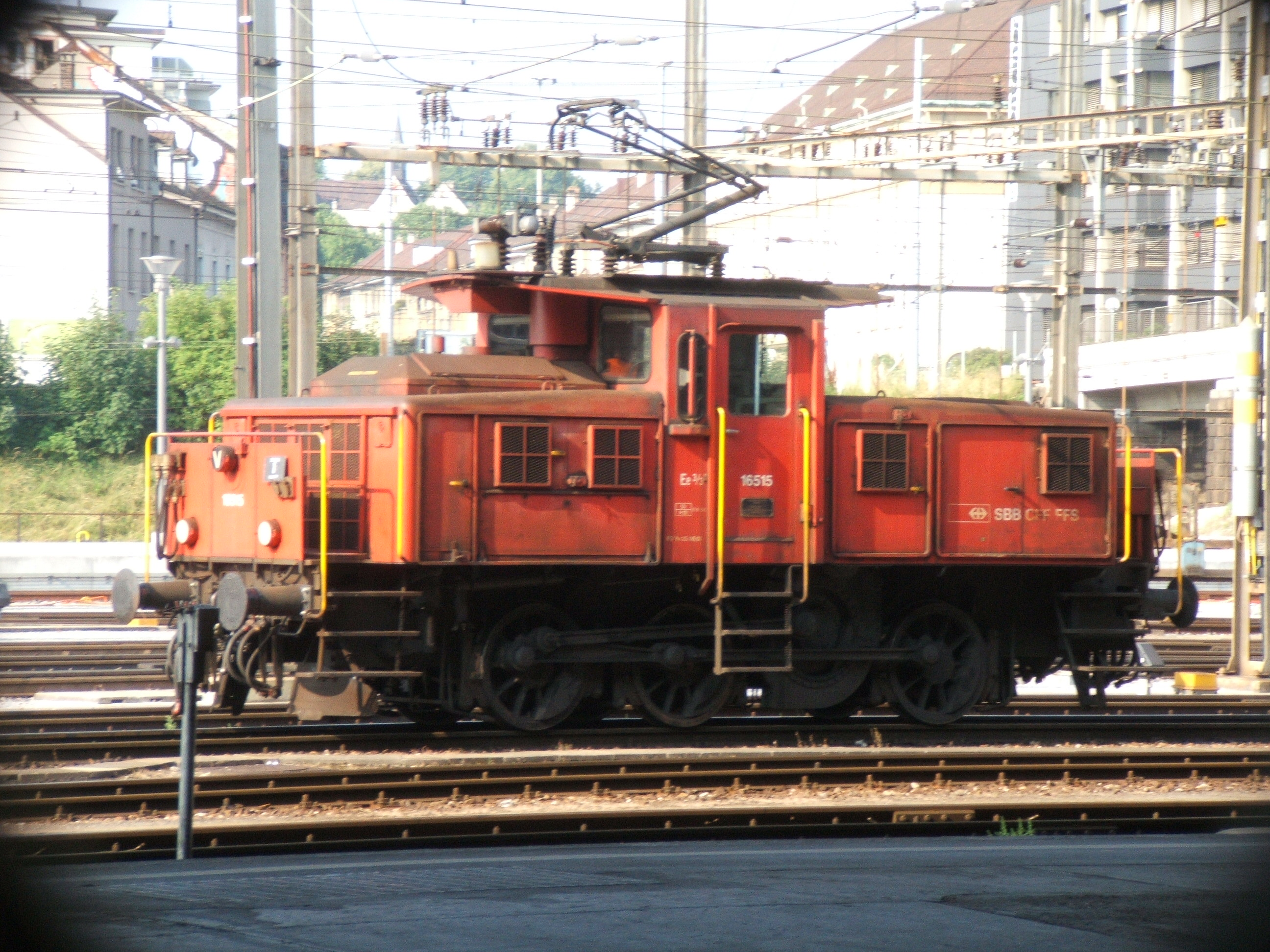 Een SBB rangeerloc in Basel SBB.